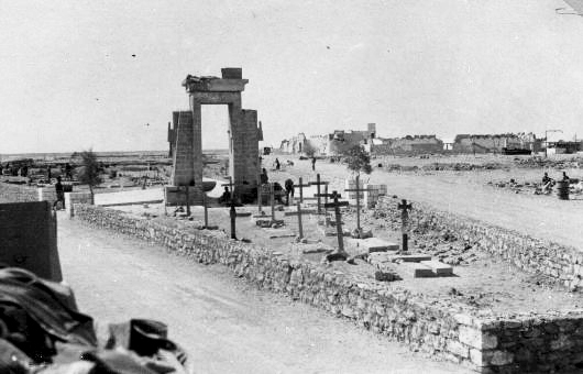 Tombe di militari tedeschi al Bivio che porta a El al